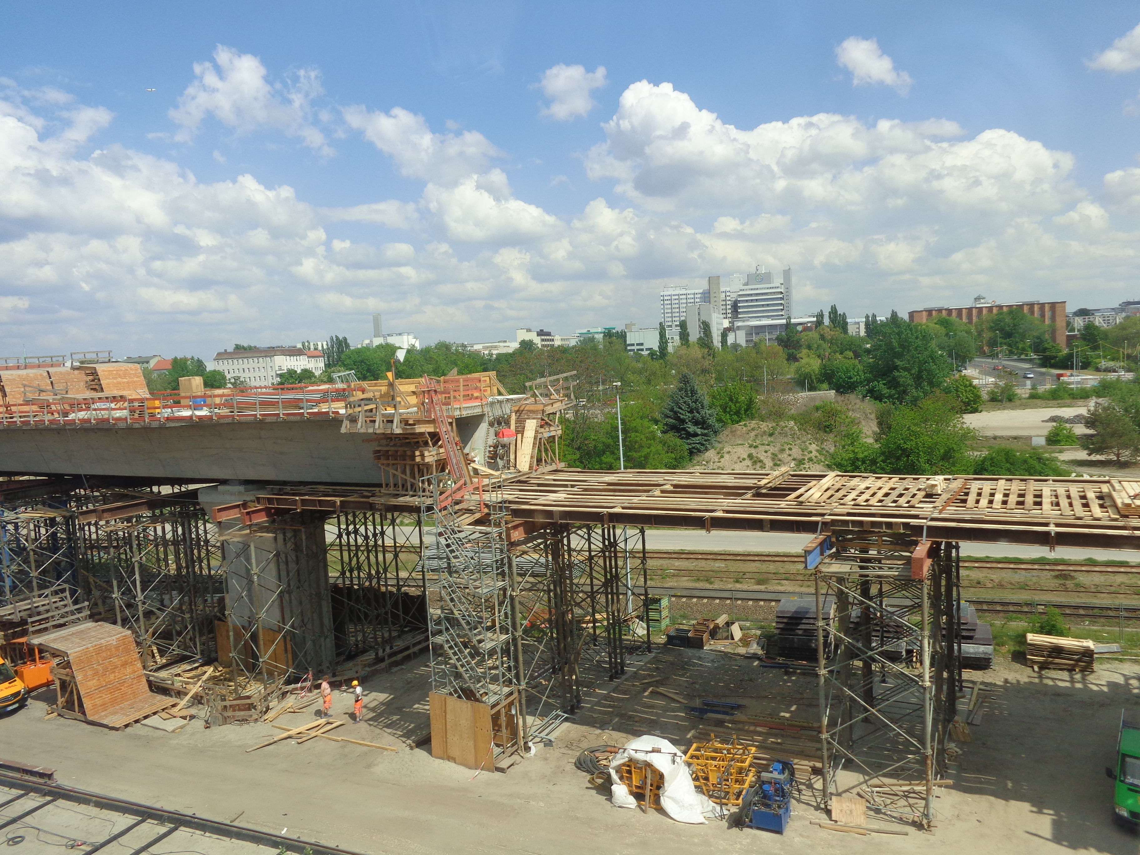 Bau eines Viadukts für die S21 (Berlin) nördlich von Berlin Hauptbahnhof